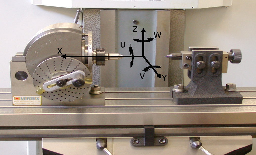 Cabezal divisor y ejes de una fresadora.